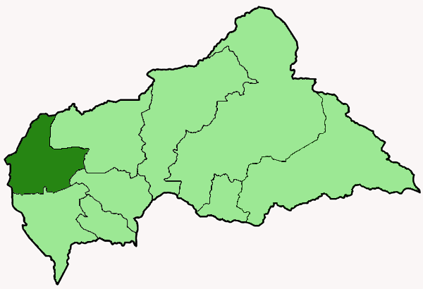 Diócesis de Bouar